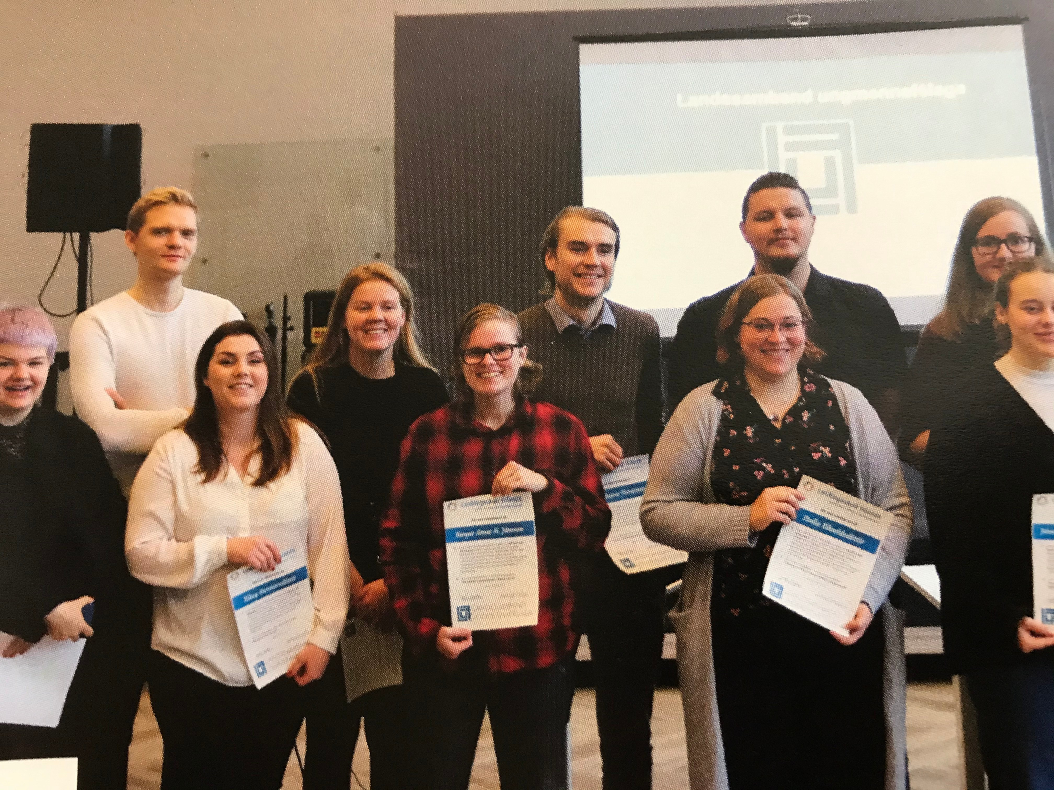 fulltrúar aðildarfélaga